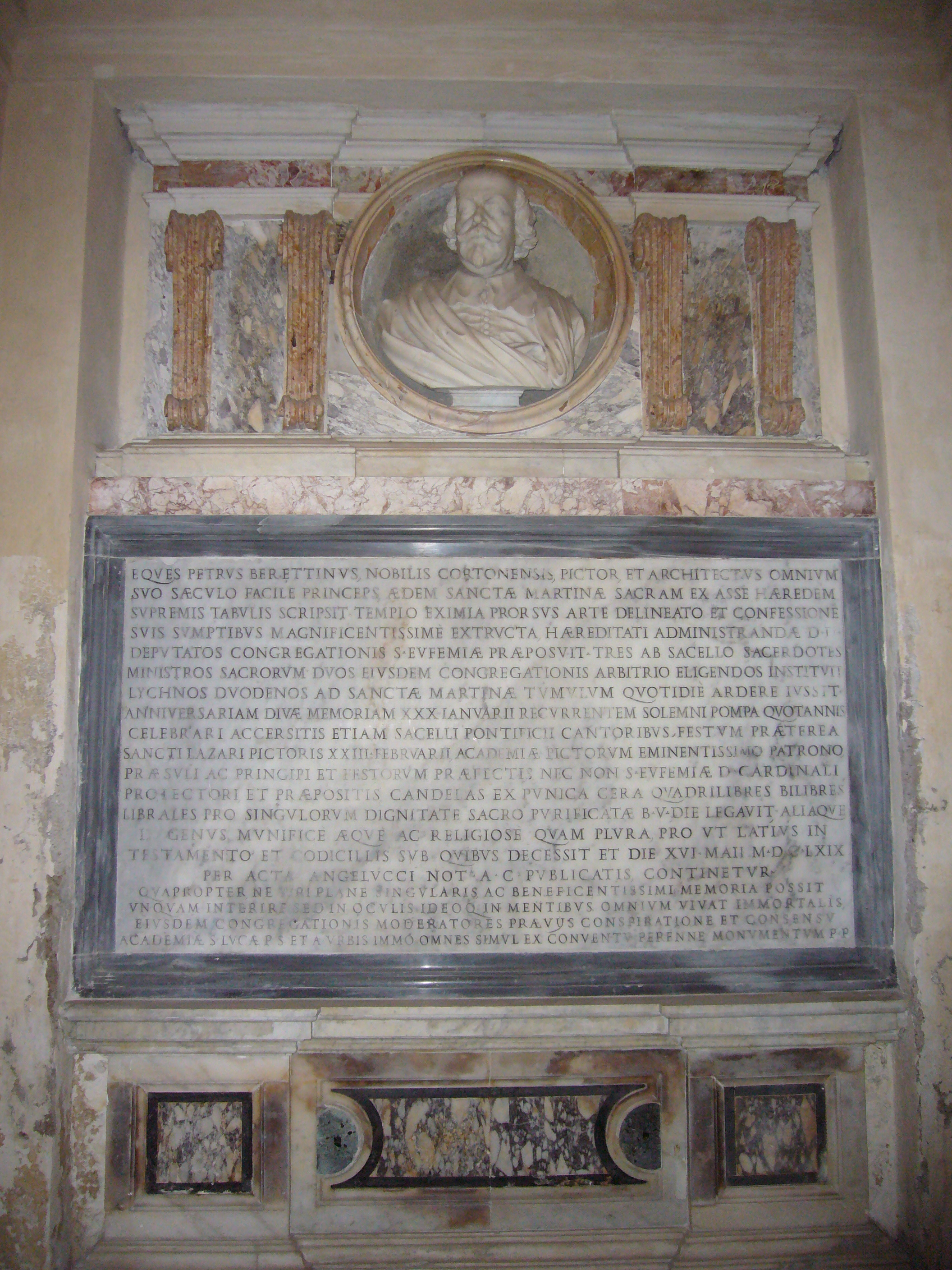 Roma, Santi Luca e Martina, cenotafio ed epigrafe testamentaria di Pietro da Cortona